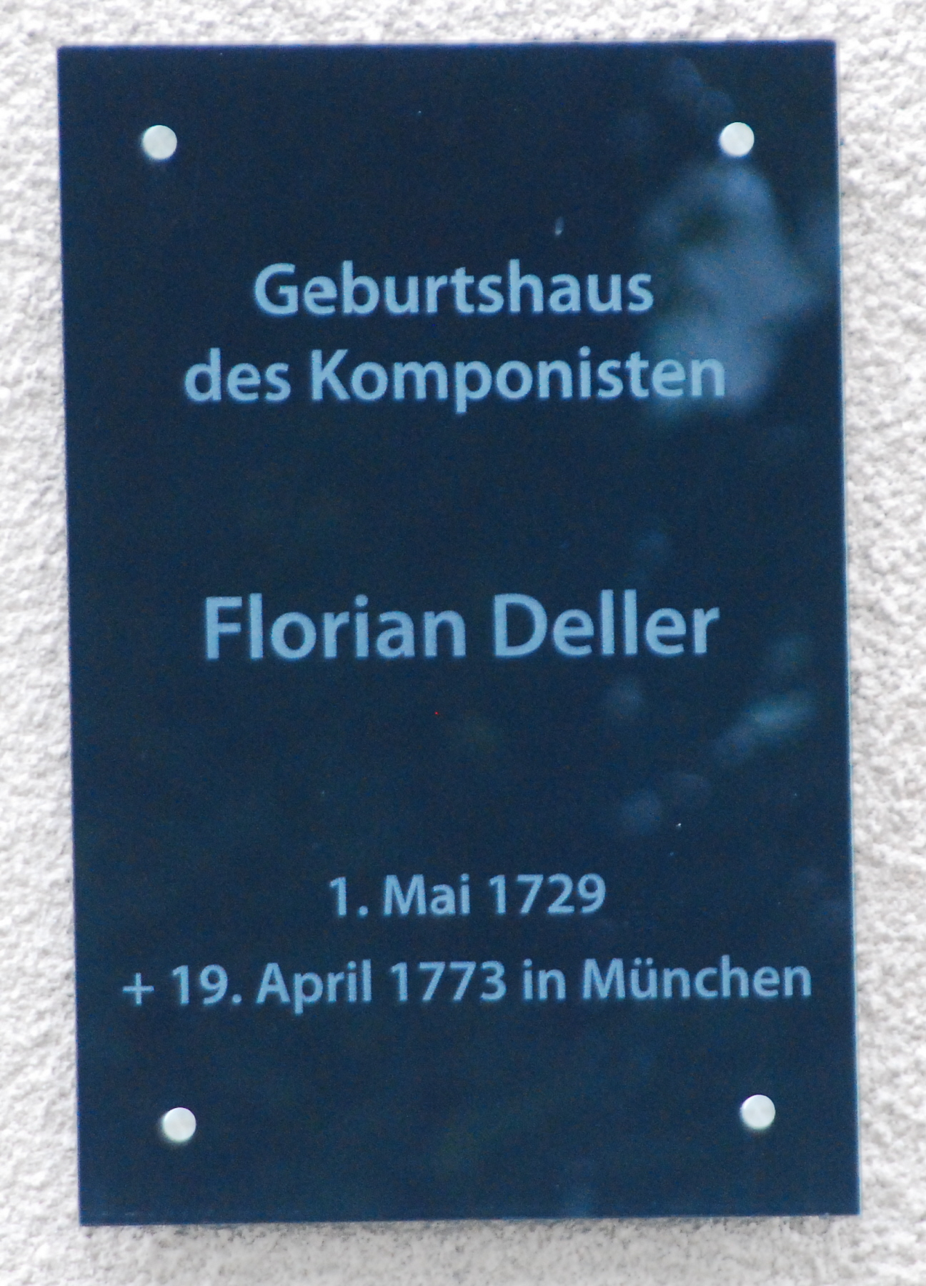 Gedenktafel für den Komponisten Florian Deller auf dem Haus Hauptplatz 33 in Drosendorf Stadt (Niederösterreich).